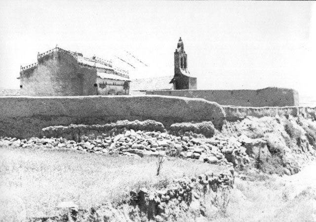 Iglesia parroquial de la Asunción - Cabezón de Valderaduey (Valladolid) - Fotografía. Papel 127 x 88 B/N